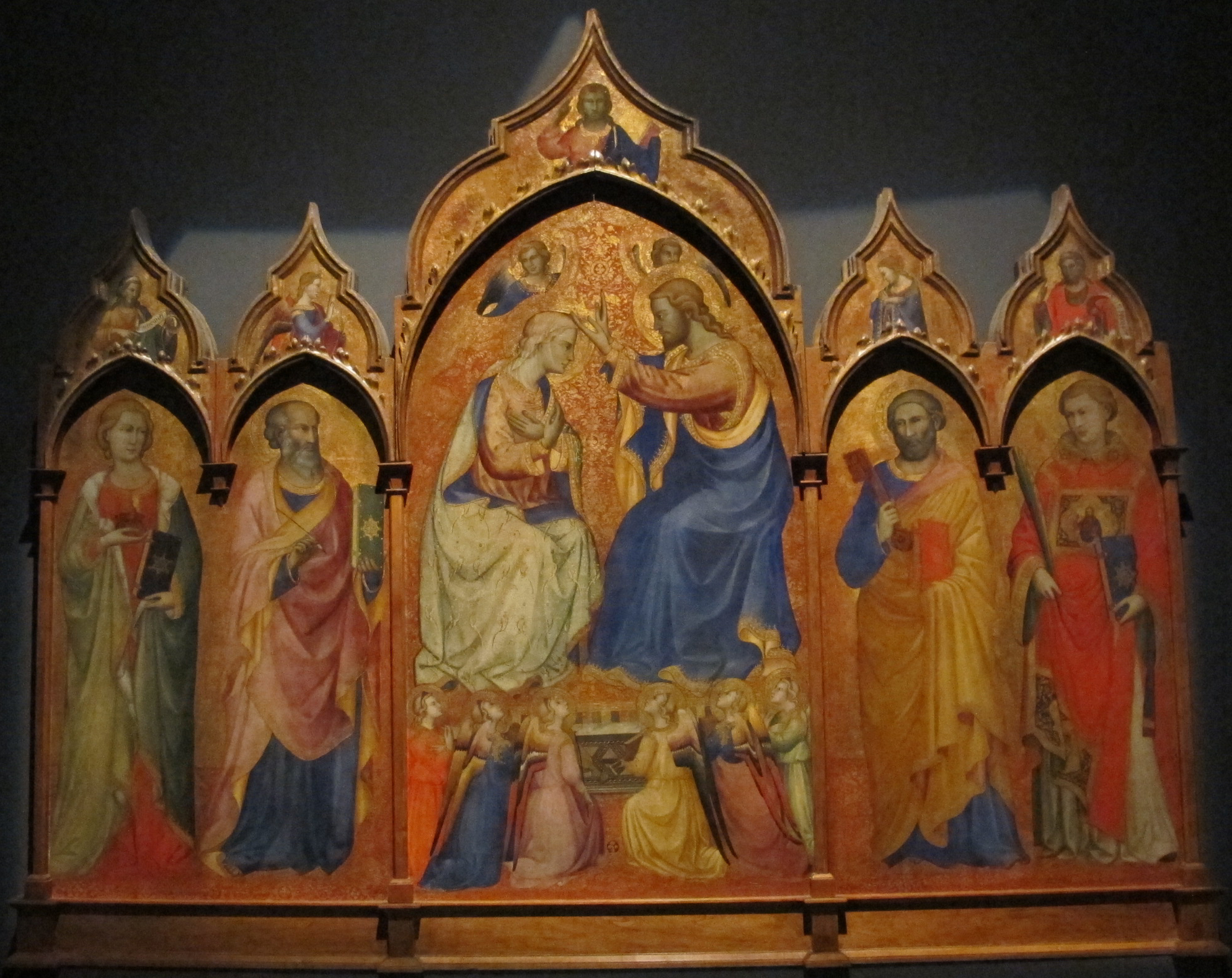 Lorenzo di niccolò, incoronazione della vergine e santi, 1410